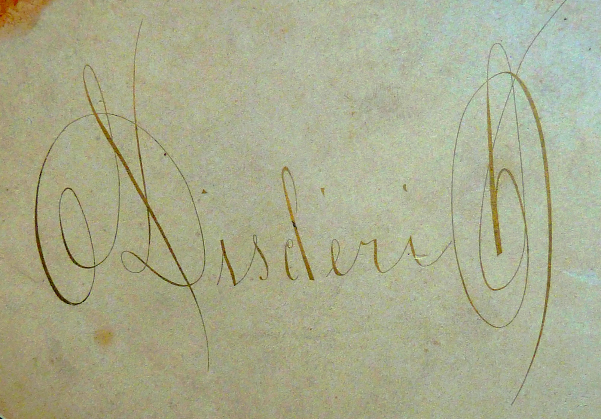 Signature manuscrite autographe du photographe André Adolphe Eugène Disdéri, encre dorée, largeur 10 cm, au dos d'une photographie, vers 1880. Collection personnelle.